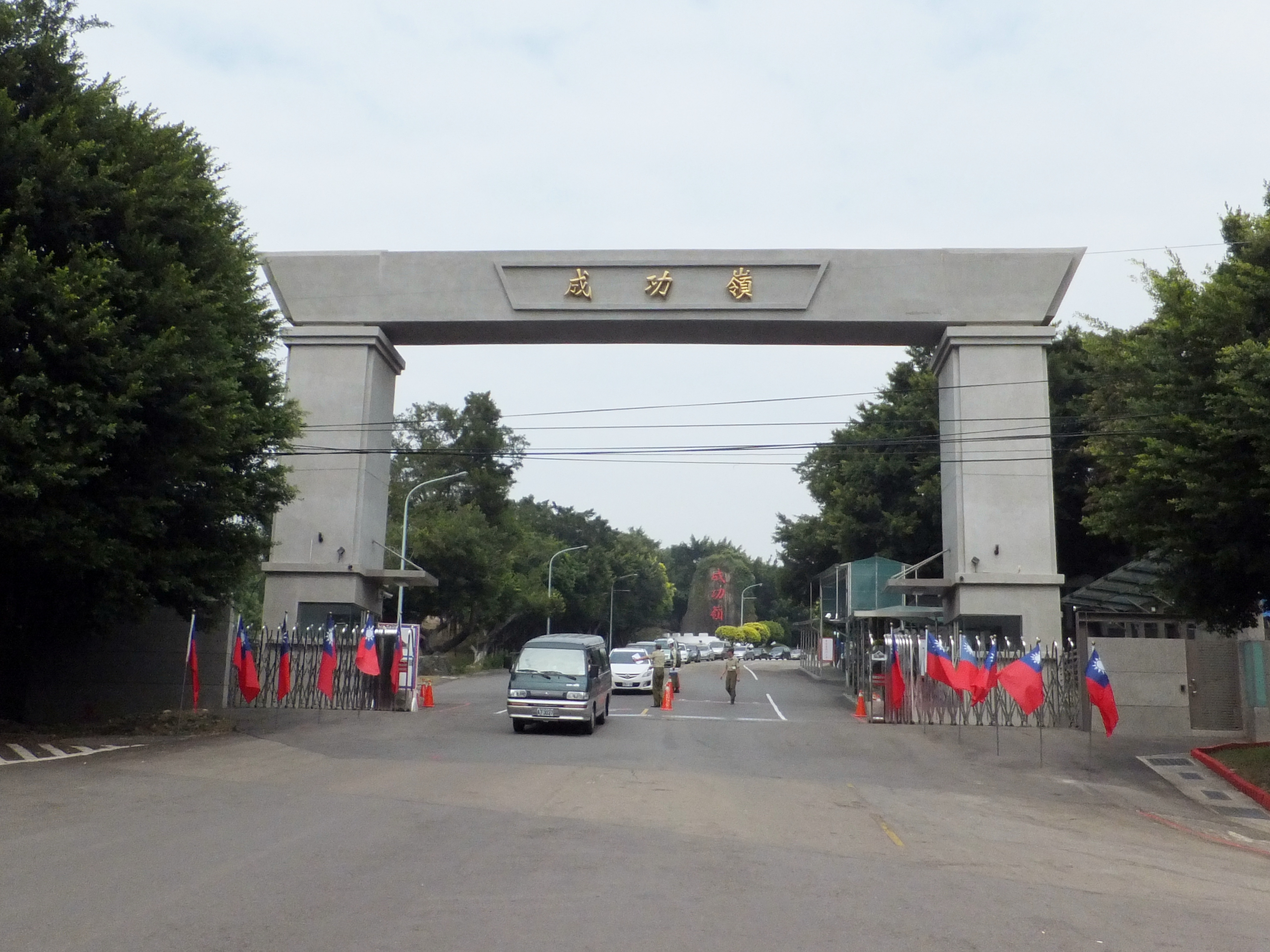 成功嶺一號哨門前。